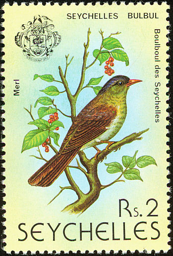 Seychelles bulbul